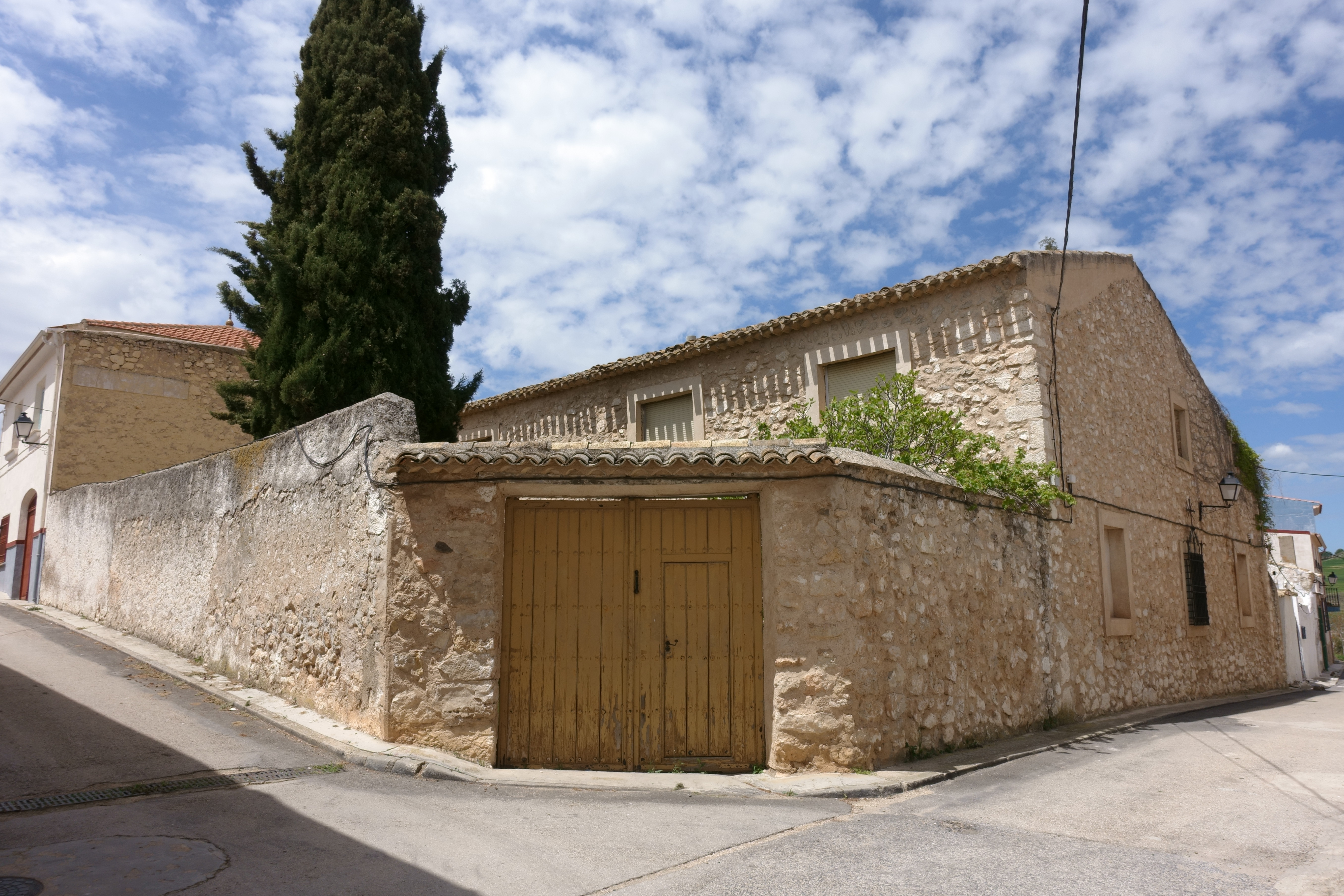 Casa Curato en Villar de la Encina (Cuenca, España).